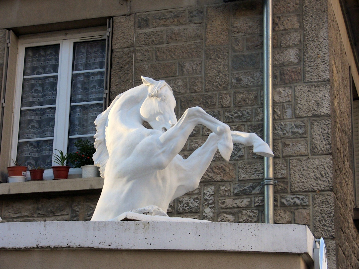 Statue d'un cheval, au haras national de Besançon (Doubs, France).